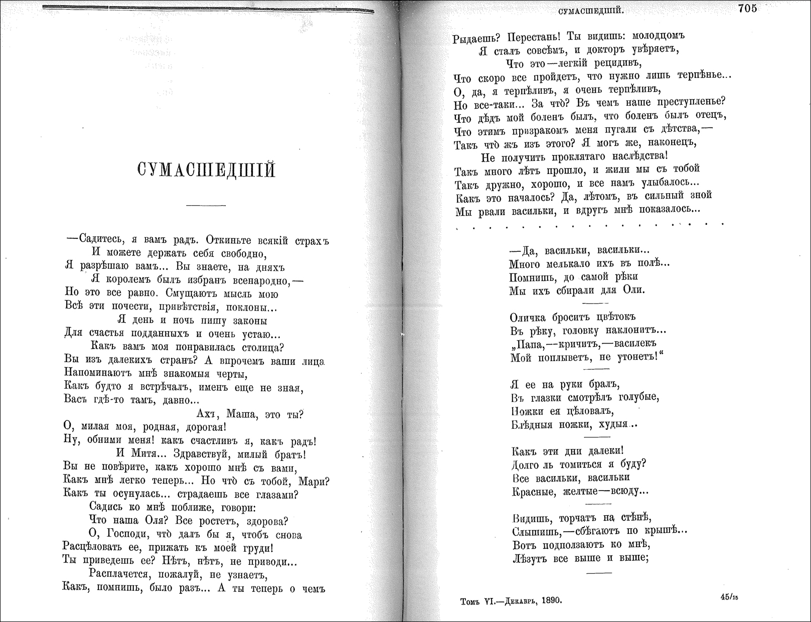 Алексей Апухтин, "Сумасшедший", стихотворение, Вестник Европы, 1890, декабрь, стр. 704-705